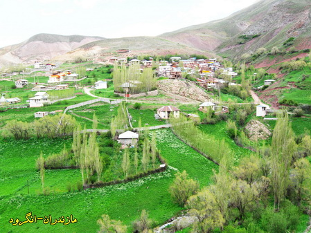 angehrud.ir